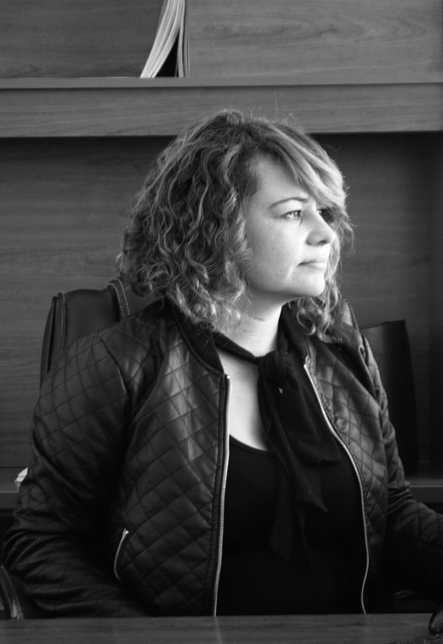 Patricia Márquez en su oficina (Secretaria de Extensión y Difusión de la Facultad de Artes de la Universidad de Artes) A partir de 2016 dirige dicha secretaría y hasta el año 2022 concluirá el mencionado puesto. Es la primera mujer que ocupa este puesto en la historia de la Facultad de Artes.